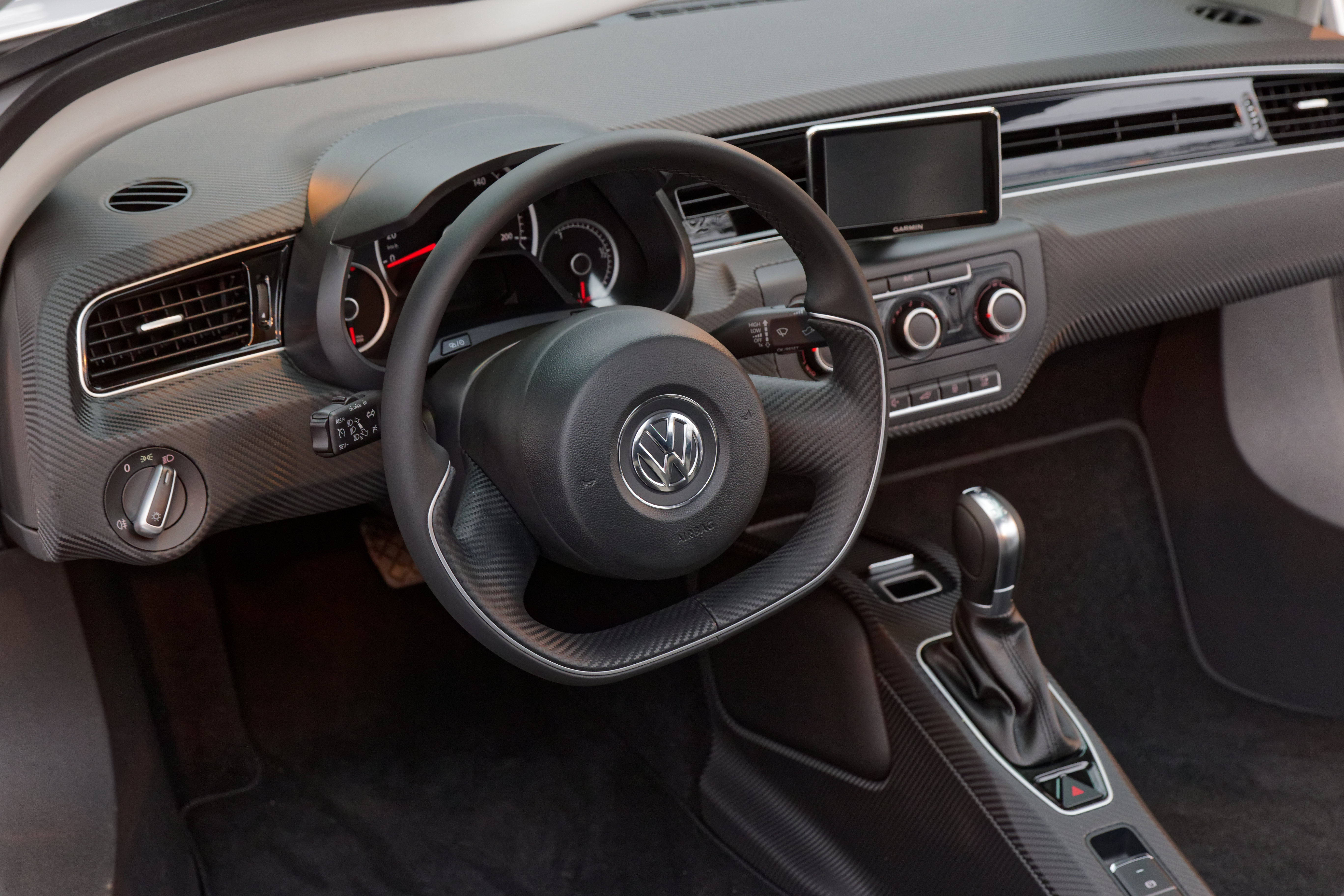 La Volkswagen XL1 exposée lors du festival automobile international 2015.